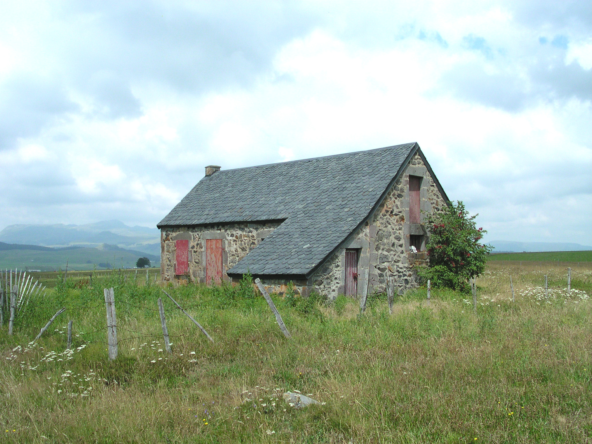 Le buron, habitat traditionnel d'été sur les estives en Auvergne. Photographie prise près de Besse-Saint-Anastaise Auteur/Author Romary août/August 2006